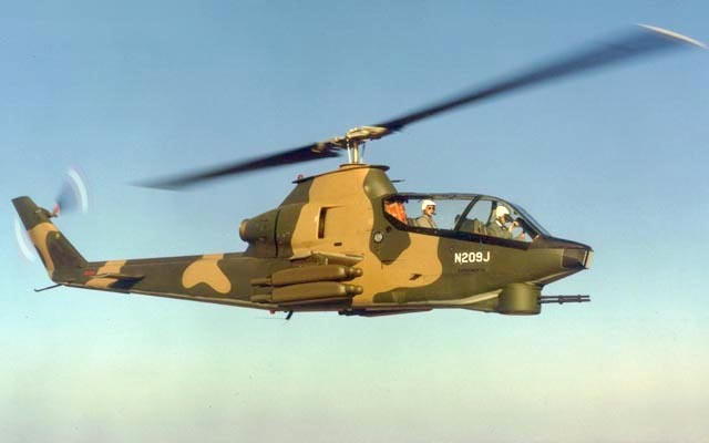 Da it::en:Image:Belln209.jpg Immagine proveniente dal sito [1] Sito governativo americano